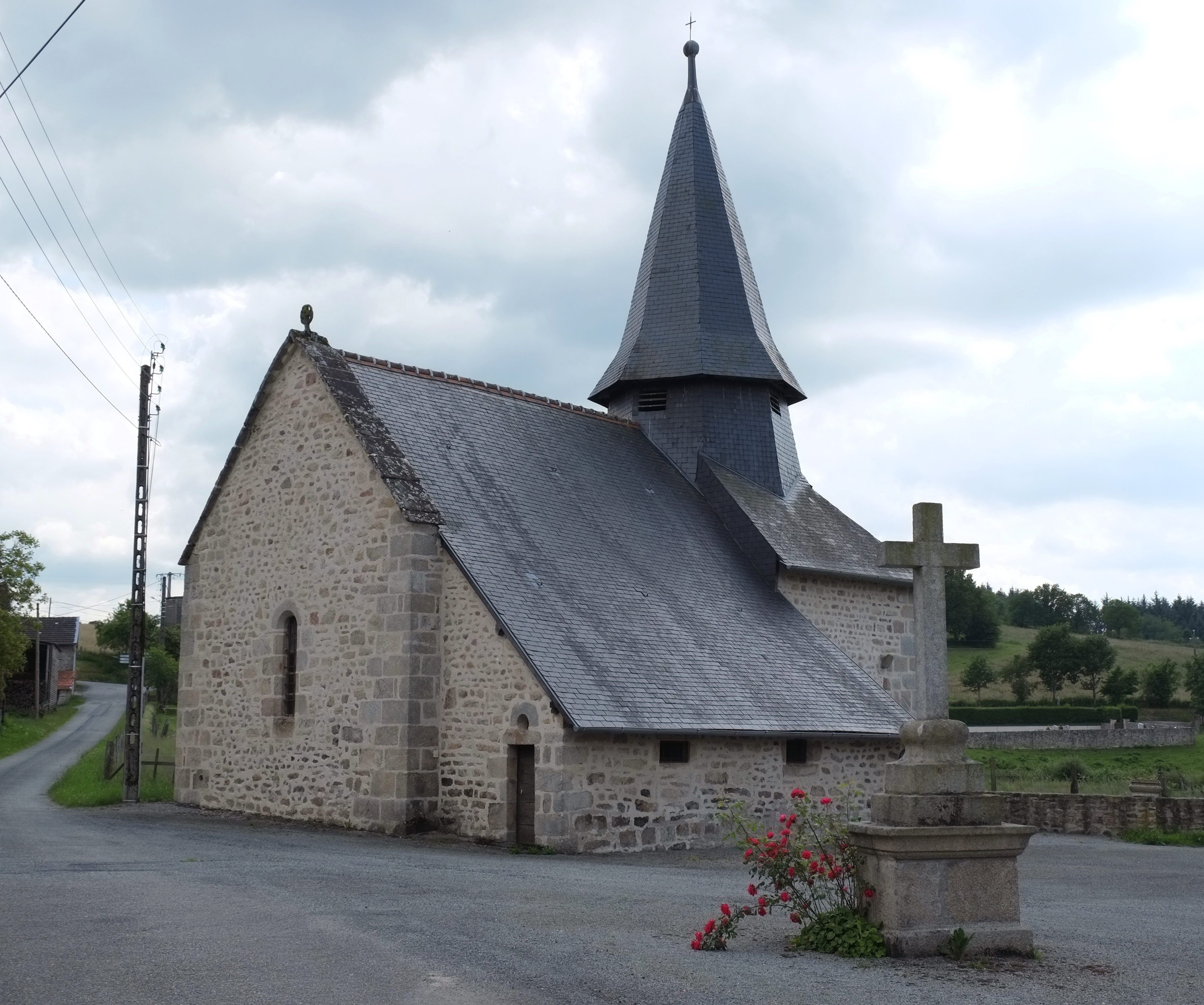 Kirche Saint-Pierre in Augne im Département Haute-Vienne in der Region Limousin (Frankreich)